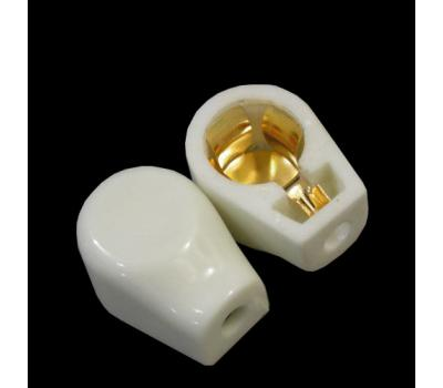 Capot céramique pour tube électronique